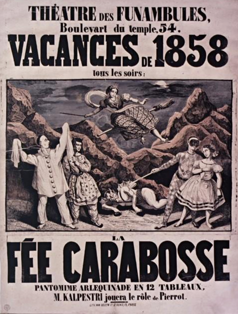 Théâtre des Funambules, vacances de 1858. Fée Carabosse